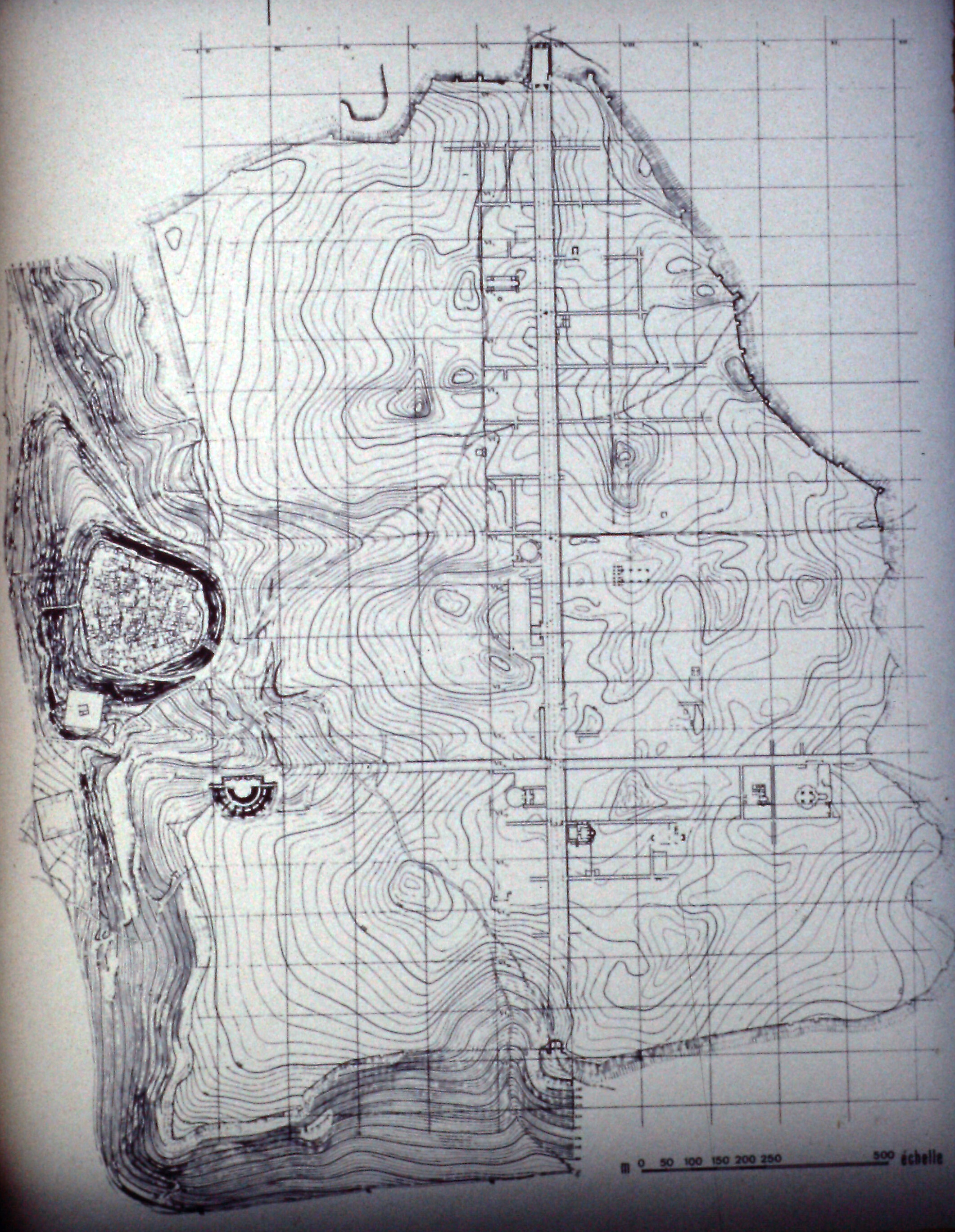 Apamea, 1993